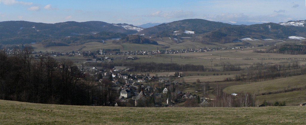 Pohled na Velké Losiny (v pozadí) a Maršíkov (v popředí)